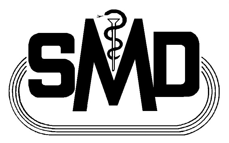 Logo des SMD der DDR